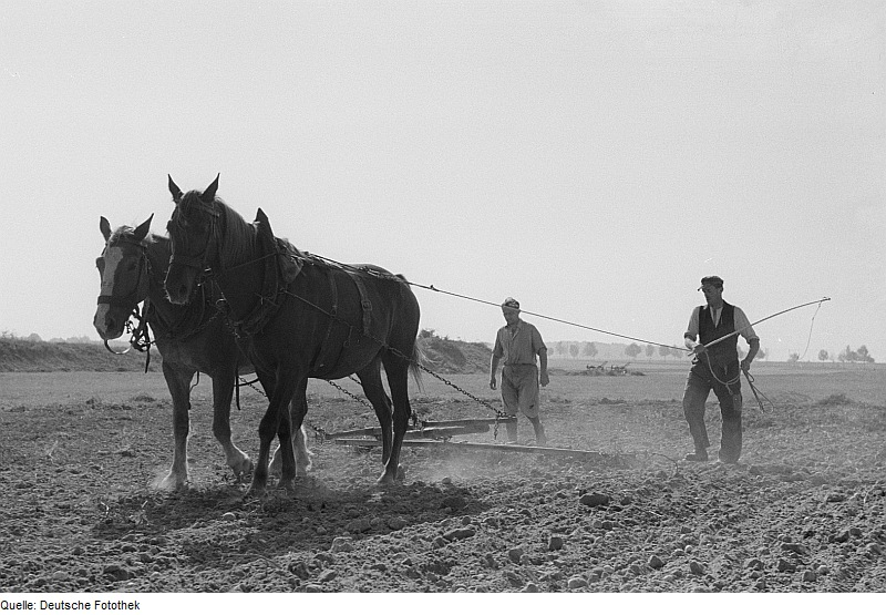 Original image description from the Deutsche Fotothek Zwei Pferde ziehen eine Egge über ein Kartoffelfeld, im Hintergrund zwei Bauern von der LPG "Freier Bauer", einer davon mit Zügel und Peitsche in der Hand bei Großbardau